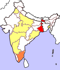 Kartorna bygger på resultat i senaste delstatsval (Juni 2004). Rött betyder att partiet deltar i delstatsregeringen, orange att partiet vann mandat i senaste delstatsvalet och gult att partiet hade lanserat kandidater men utan att vinna mandat. Kartorna tar inte hänsyn till avhopp, partifusioner och fyllnadsval under den ordinarie mandatperiodens gång.